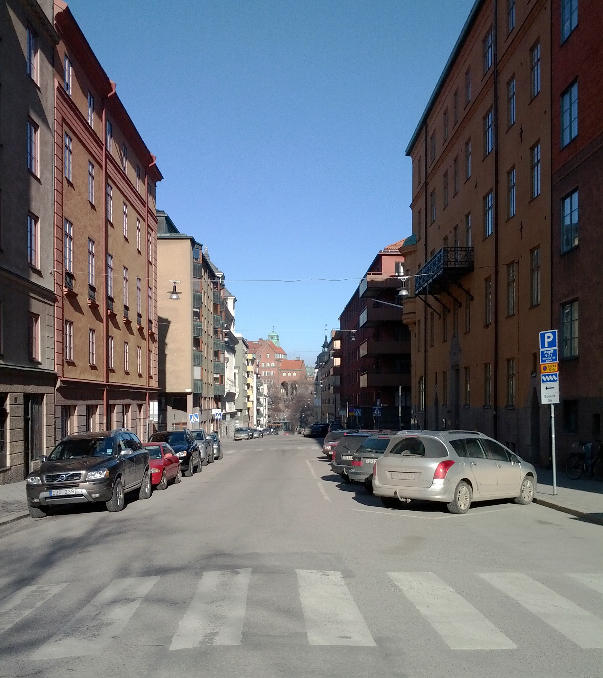 Borgmastargatan 2012